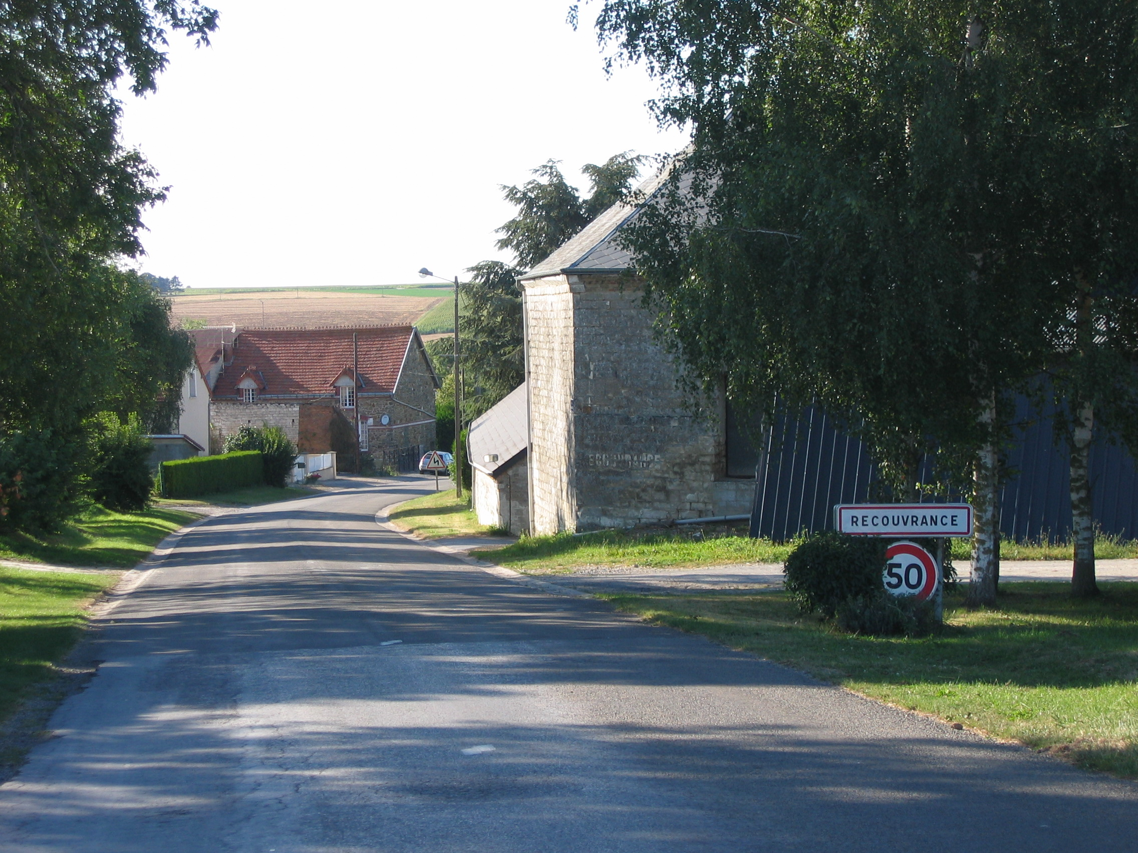 Entrée Recouvrance Banogne-Recouvrance Ardennes France